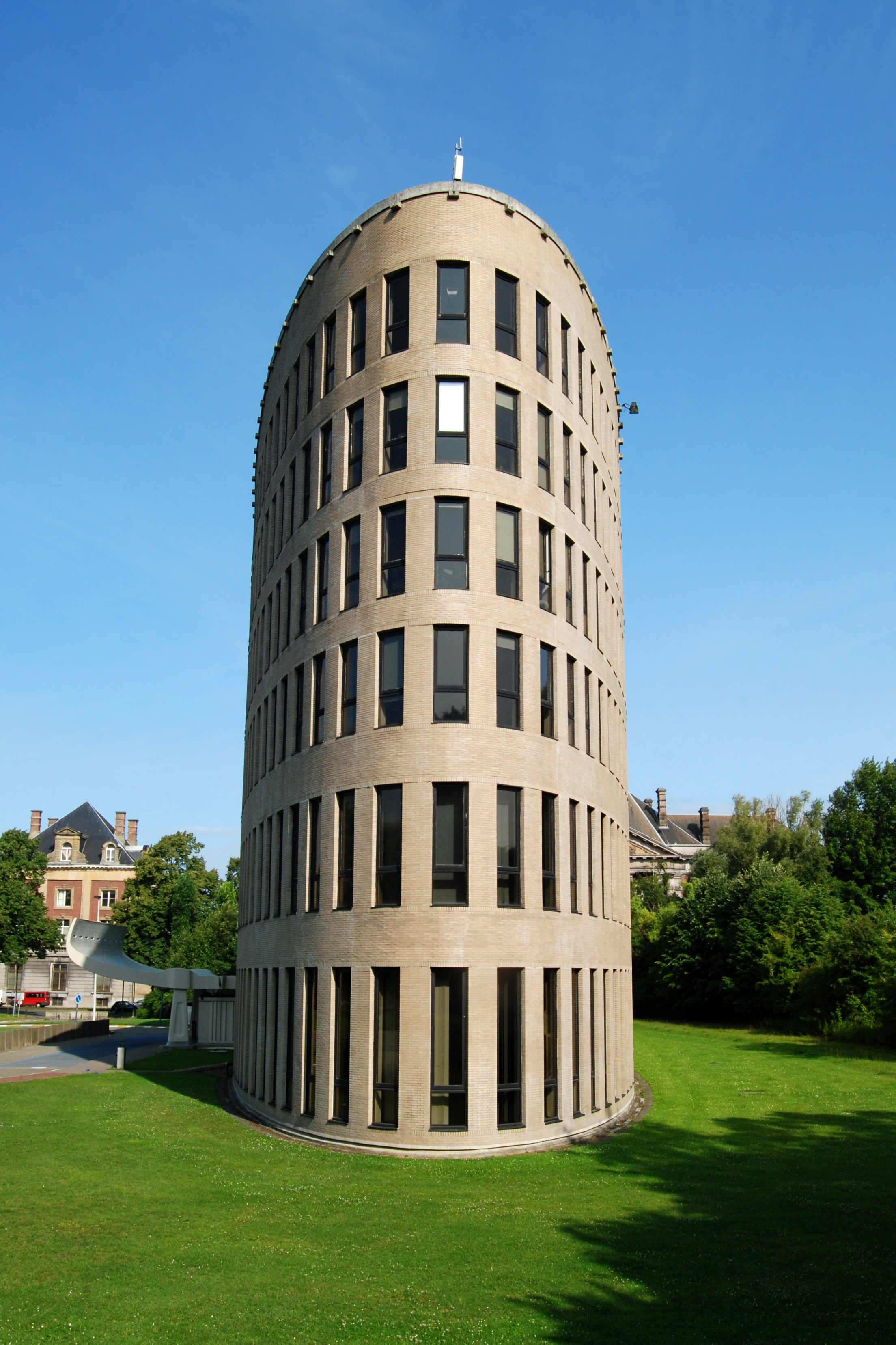 Belgique - Bruxelles - Vrije Universiteit Brussel (VUB) - Rectorat (Architecture fonctionnaliste - Renaat Braem - 1971-1978)